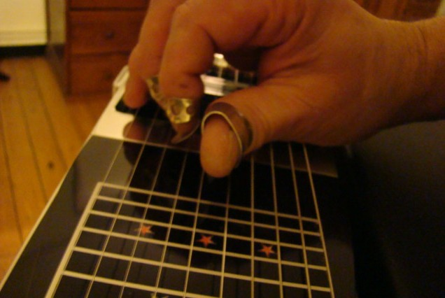 picks